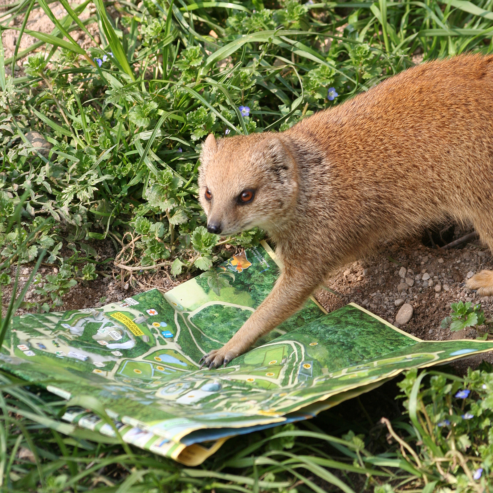 Parco Natura Viva - Pastrengo